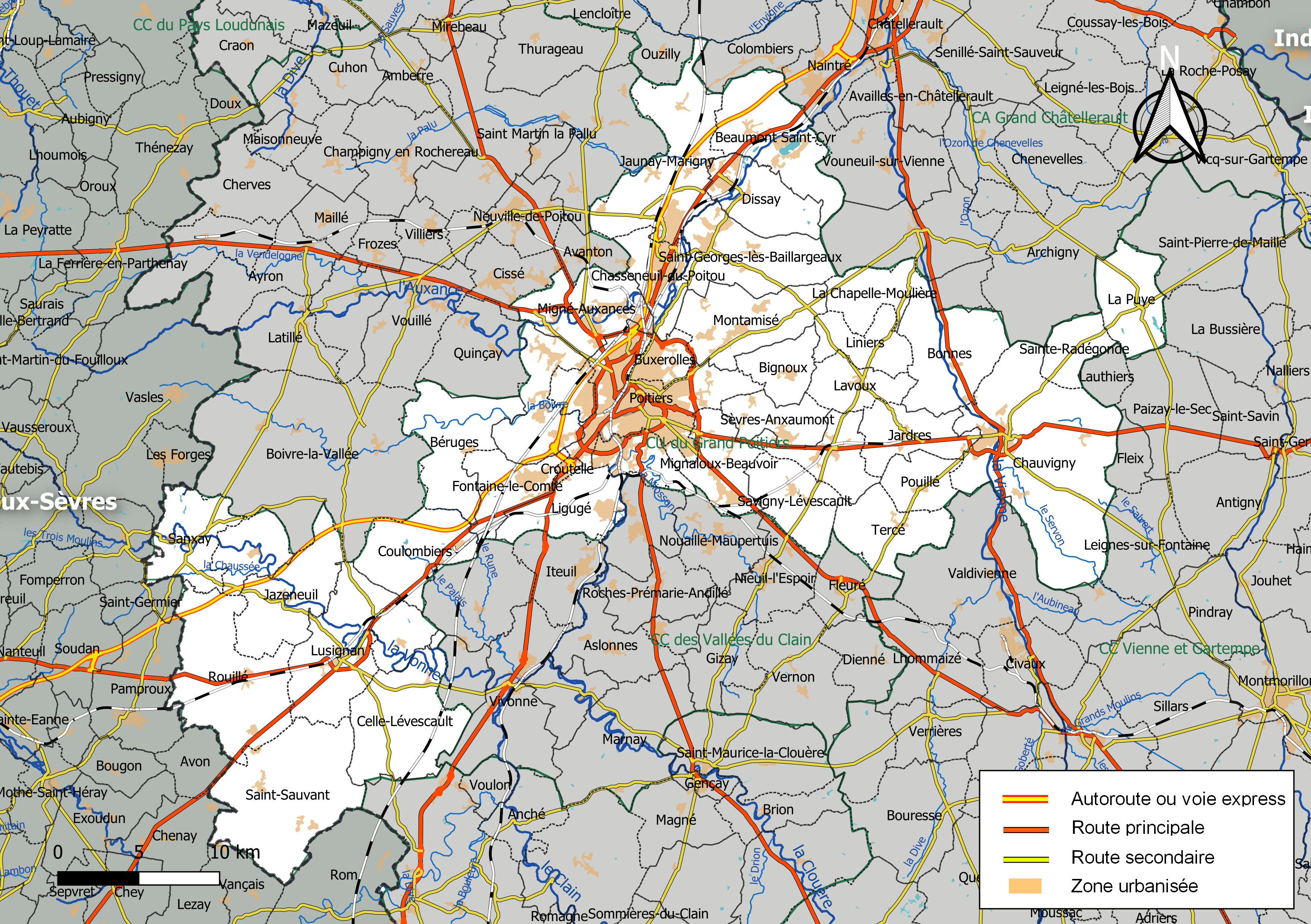 Carte géographique de la Communauté urbaine du Grand Poitiers, département de la Vienne, France. Composition au 1er janvier 2019.